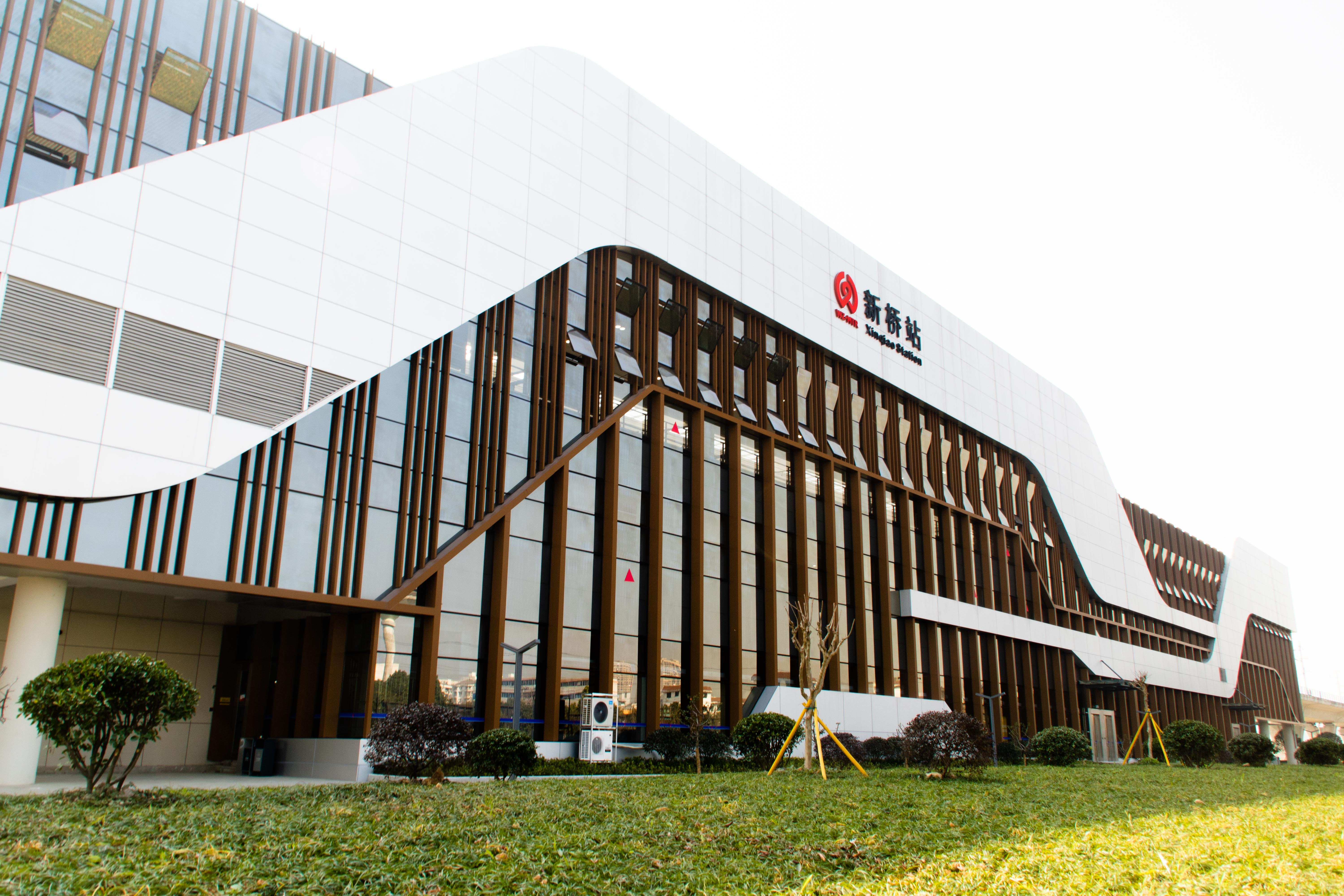 中文（中国大陆）: 新桥站站房